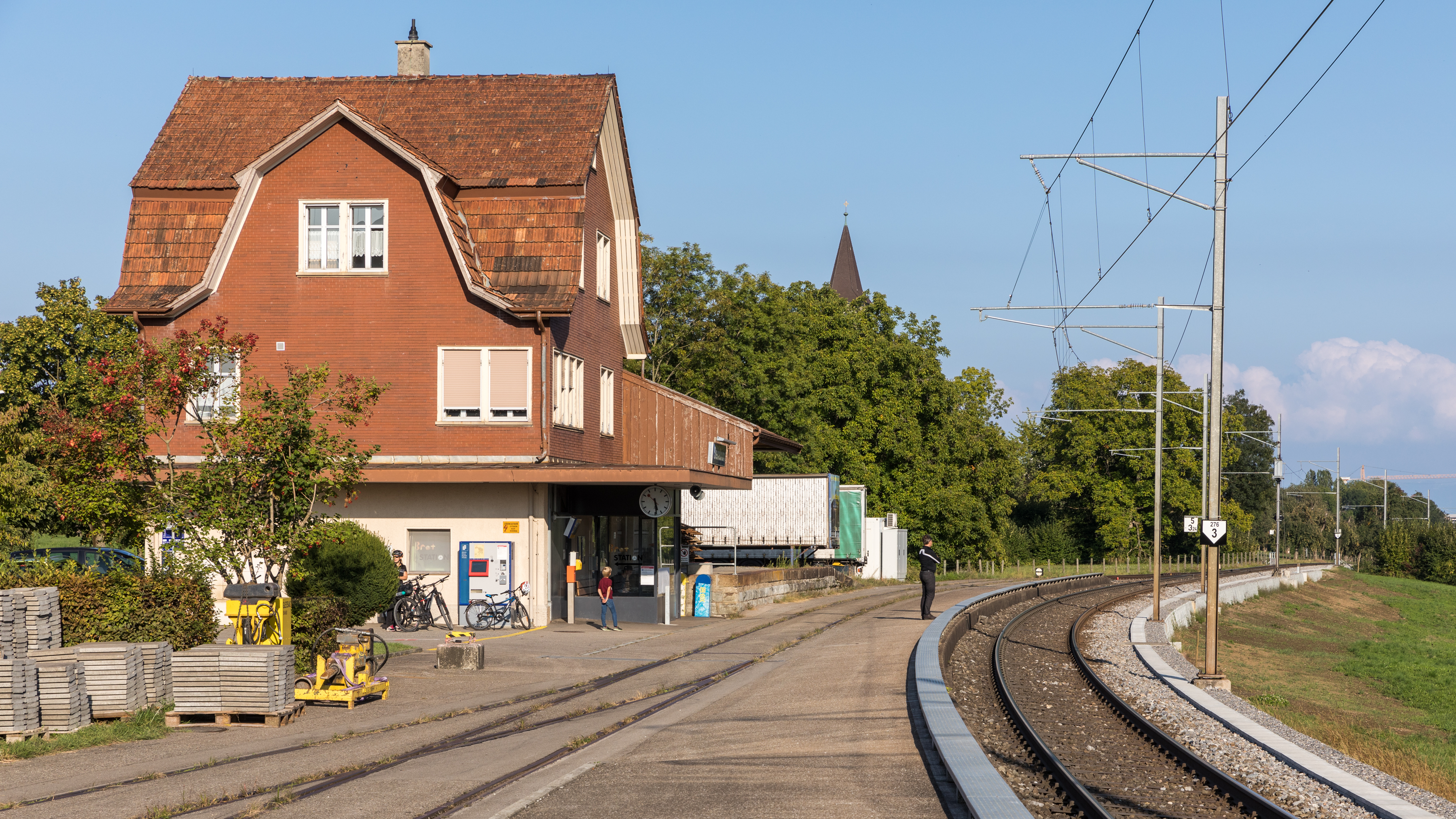 Bahnhof Steinebrunn (Egnach) im Sept. 2018